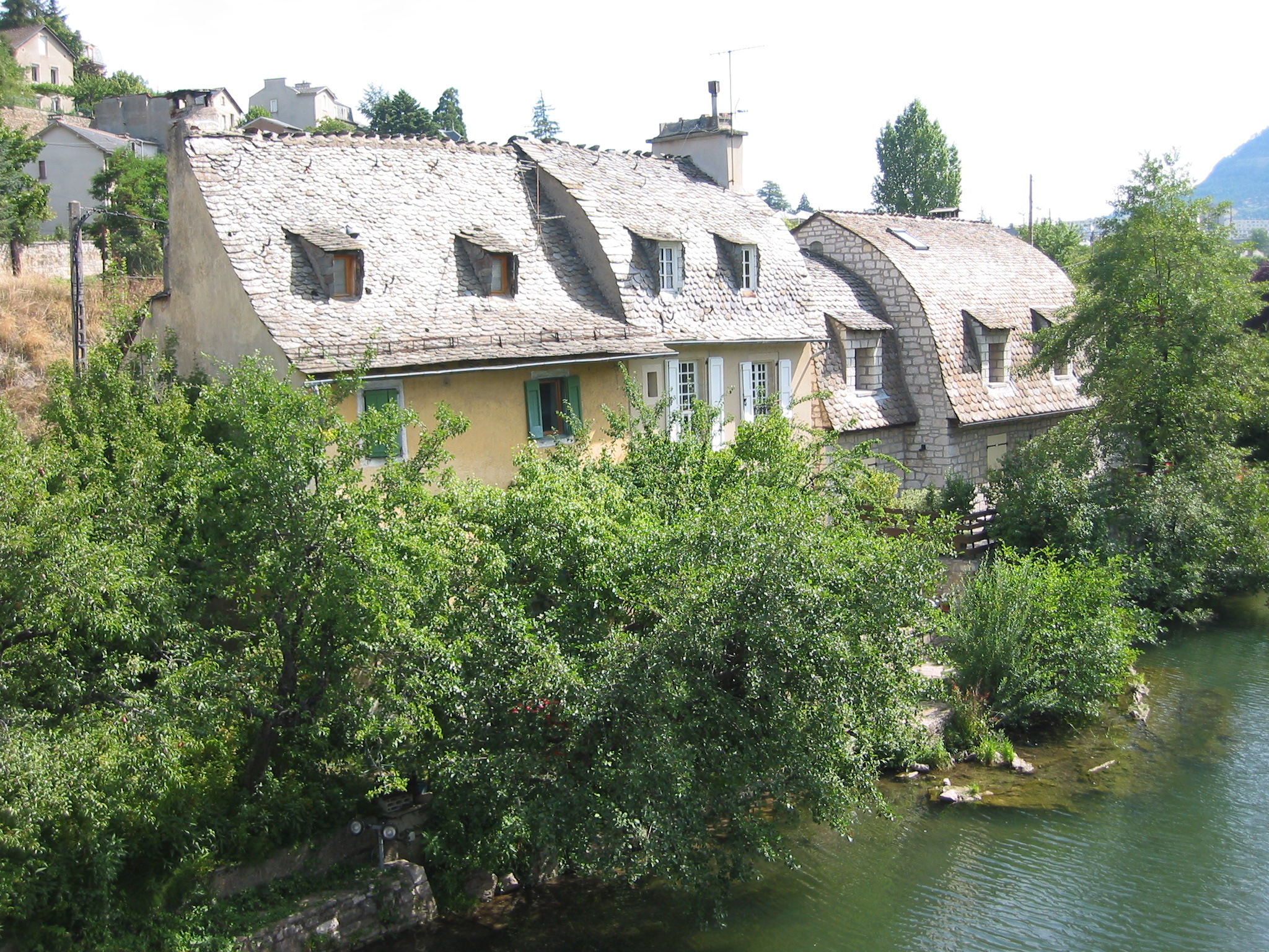 Mende, Lozère, France Une maison typique avec son toit en carène, sur les berges du lot.